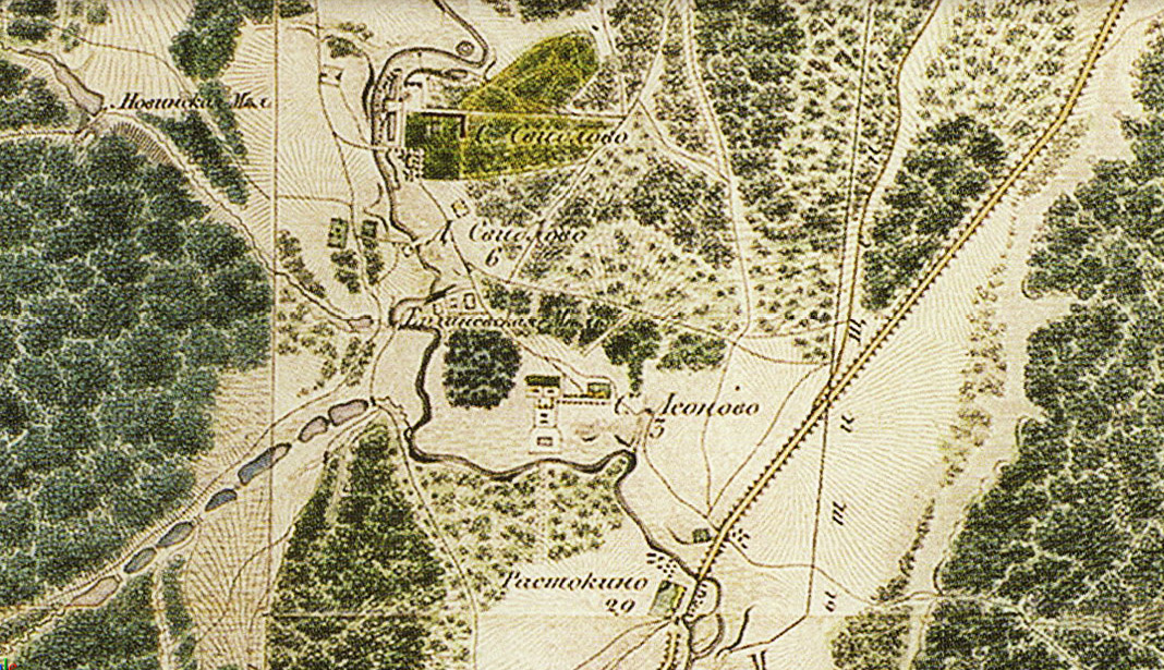 Свиблово, Ростокино, Леоново на топографической карте 1823 года.